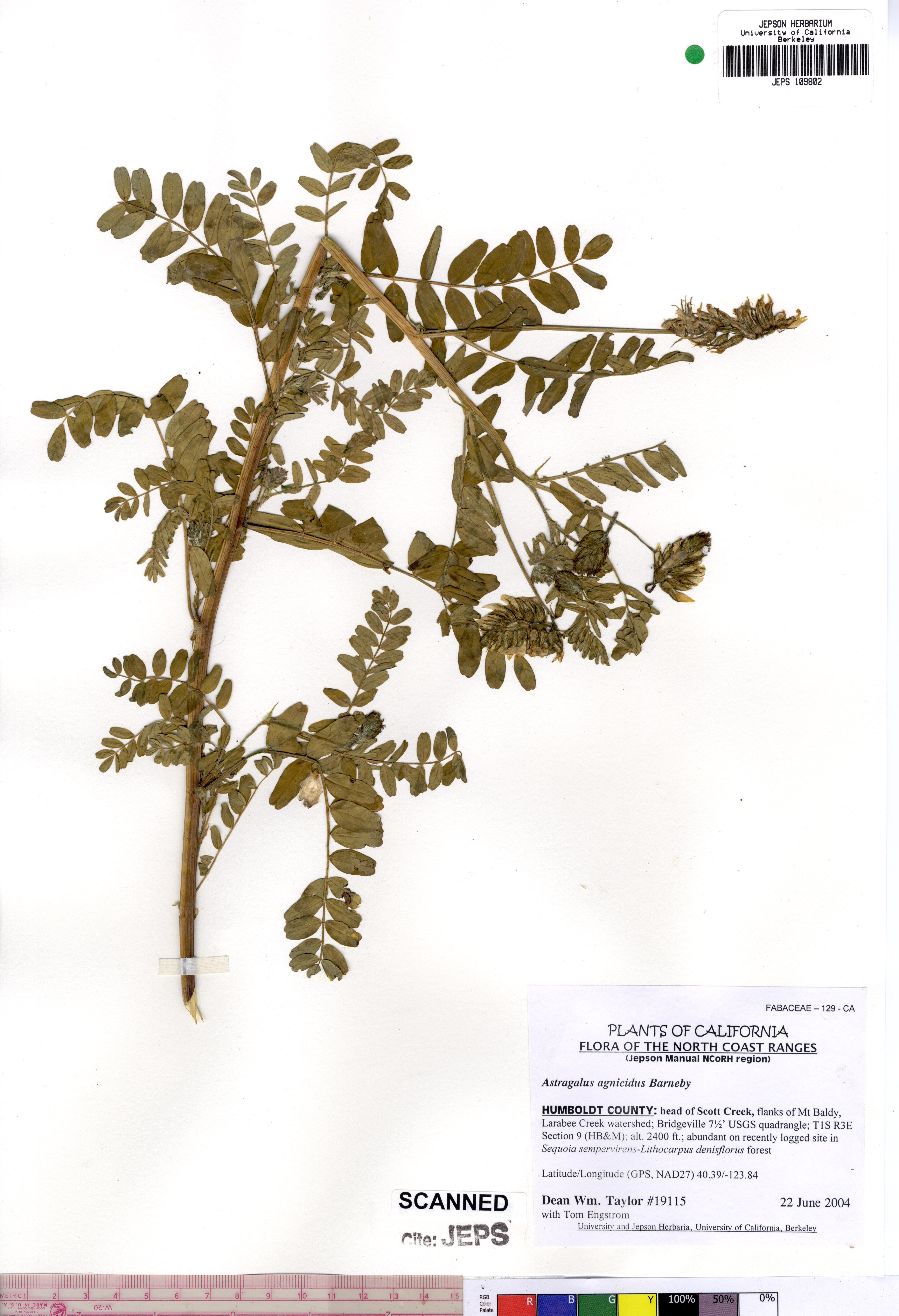 Astragalus agnicidus JEPS109802